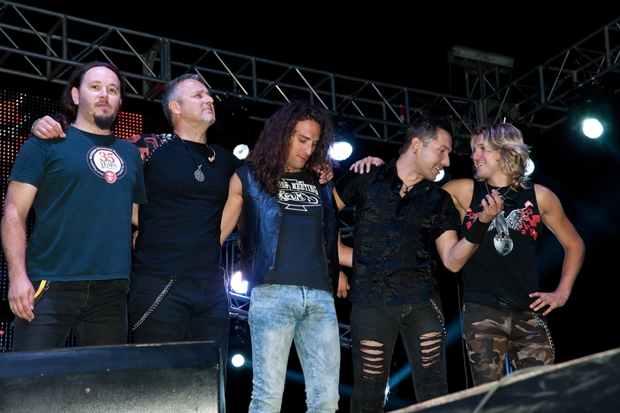 Marko Perković u Crikvenici